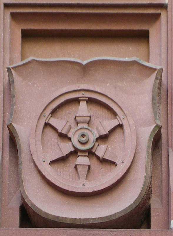 Wappen von Frankfurt-Höchst an der Fassade des Römer